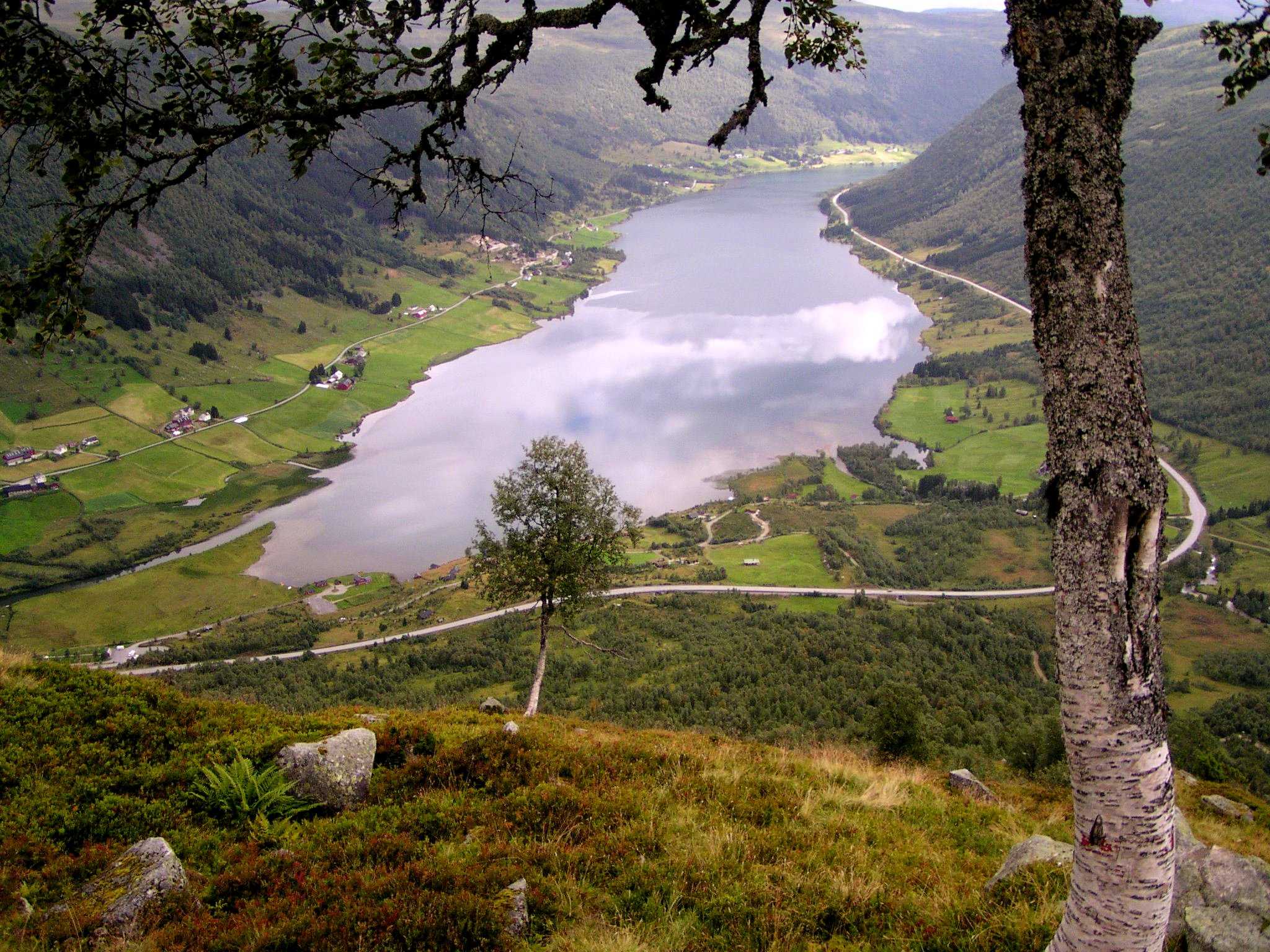 Dalavatnet in Sogn og Fjordane, Norway